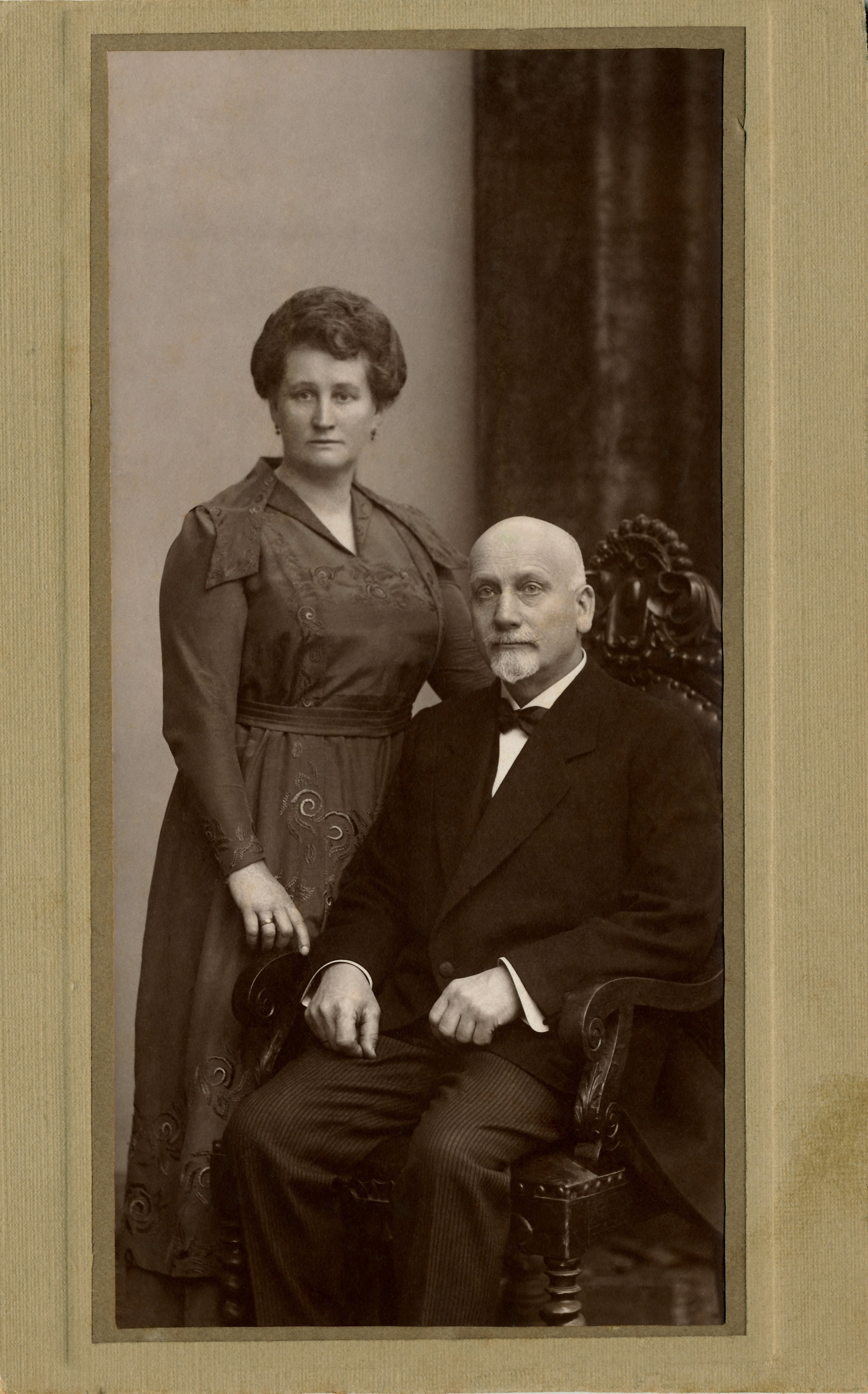 Porträt eines älteren Ehepaares.